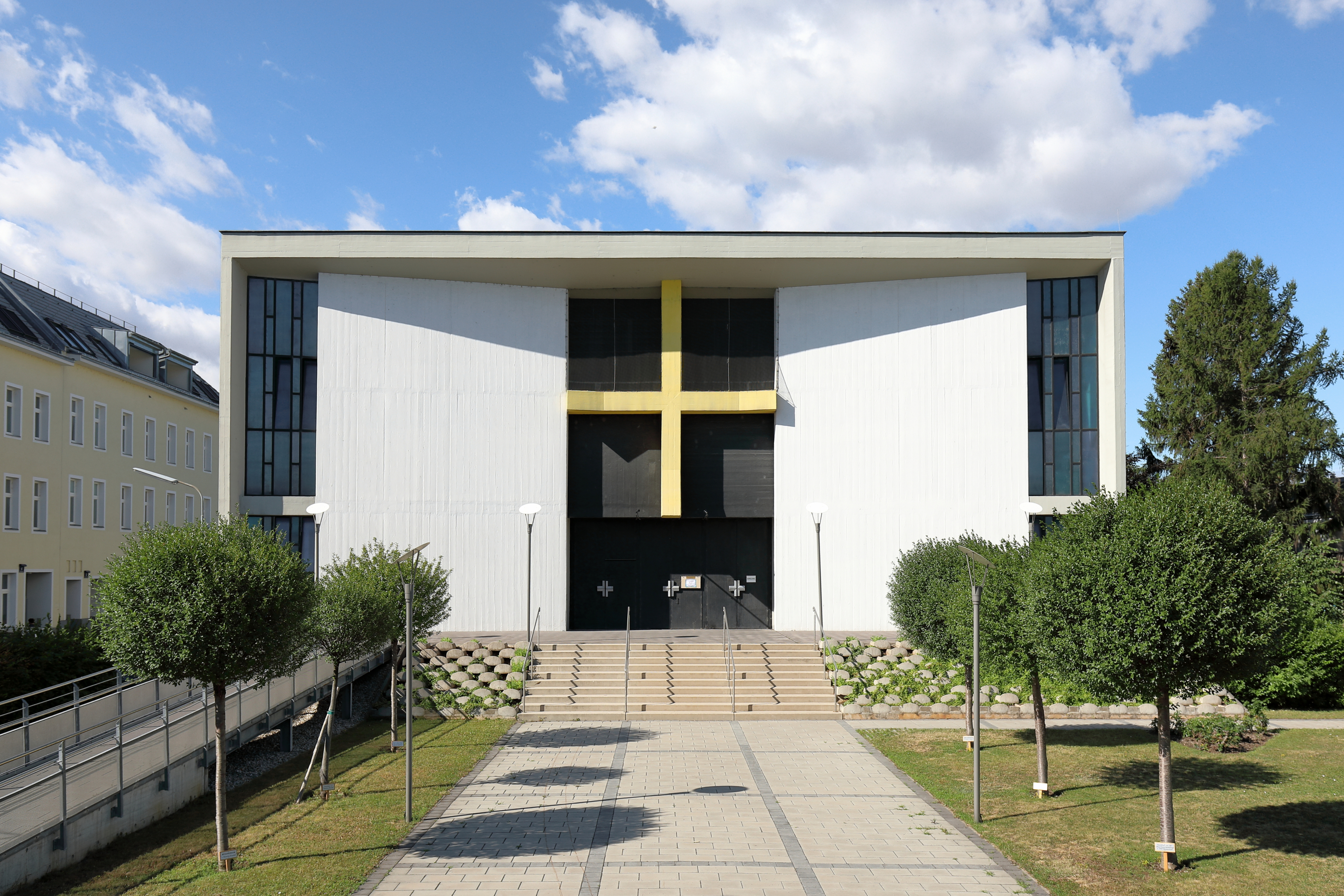 Die Neukagraner Pfarrkirche im 22. Wiener Gemeindebezirk Donaustadt.Die Saalkirche mit trapezförmigen Grundriss wurde ab 1959 nach den Plänen der Architekten Peter Czernin und Lukas Matthias Lang errichtet und im Dezember 1960 von Kardinal Franz König auf die heilige Maria Goretti geweiht. Ein geplanter campanileartiger Turm wurden nicht ausgeführt.